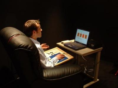 Eksperimen Micro-PK Universitas Northampton (2003).